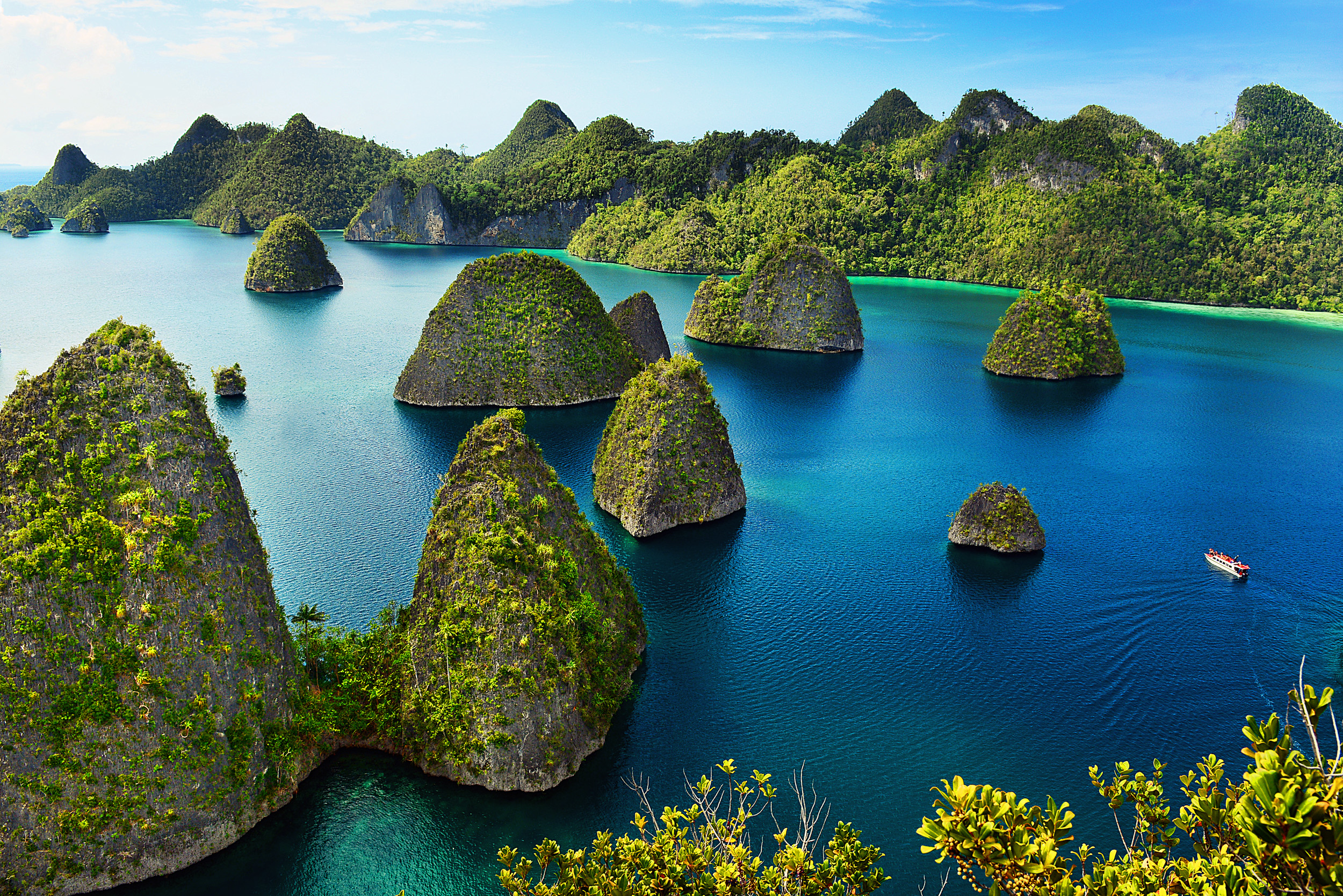 Pesona Keindahan Alam Raja Ampat yang merupakan salah satu destinasi impian dari banyak traveler dan pejalan di Indonesia.